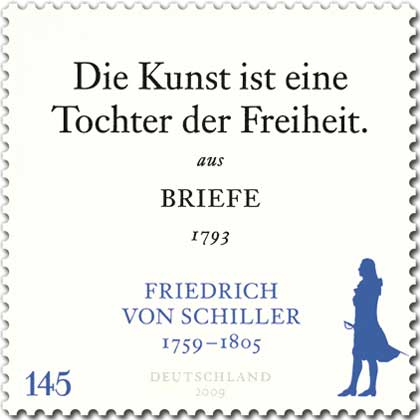 Sonderbriefmarke, 250. Geburtstag von Friedrich Schiller